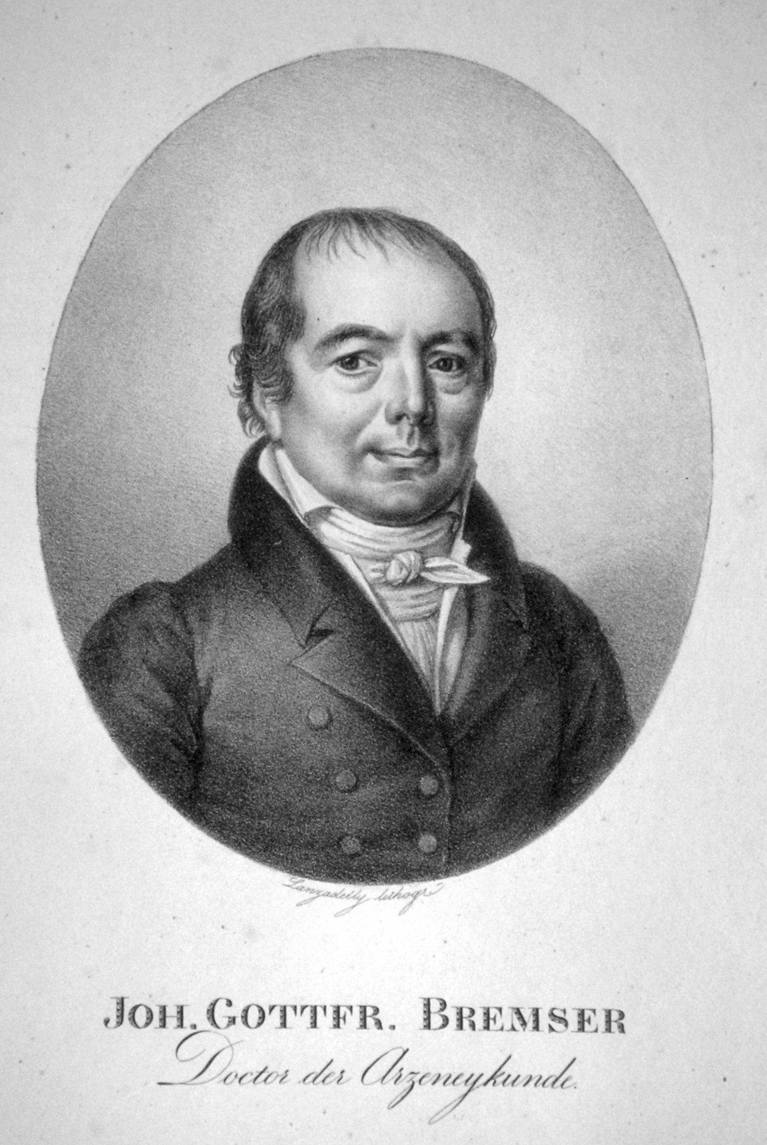 Johann Gottfried Bremser (1767-1827), österreichischer Arzt. Lithographie von Josef Lanzedelli d. Ä., ca. 1820